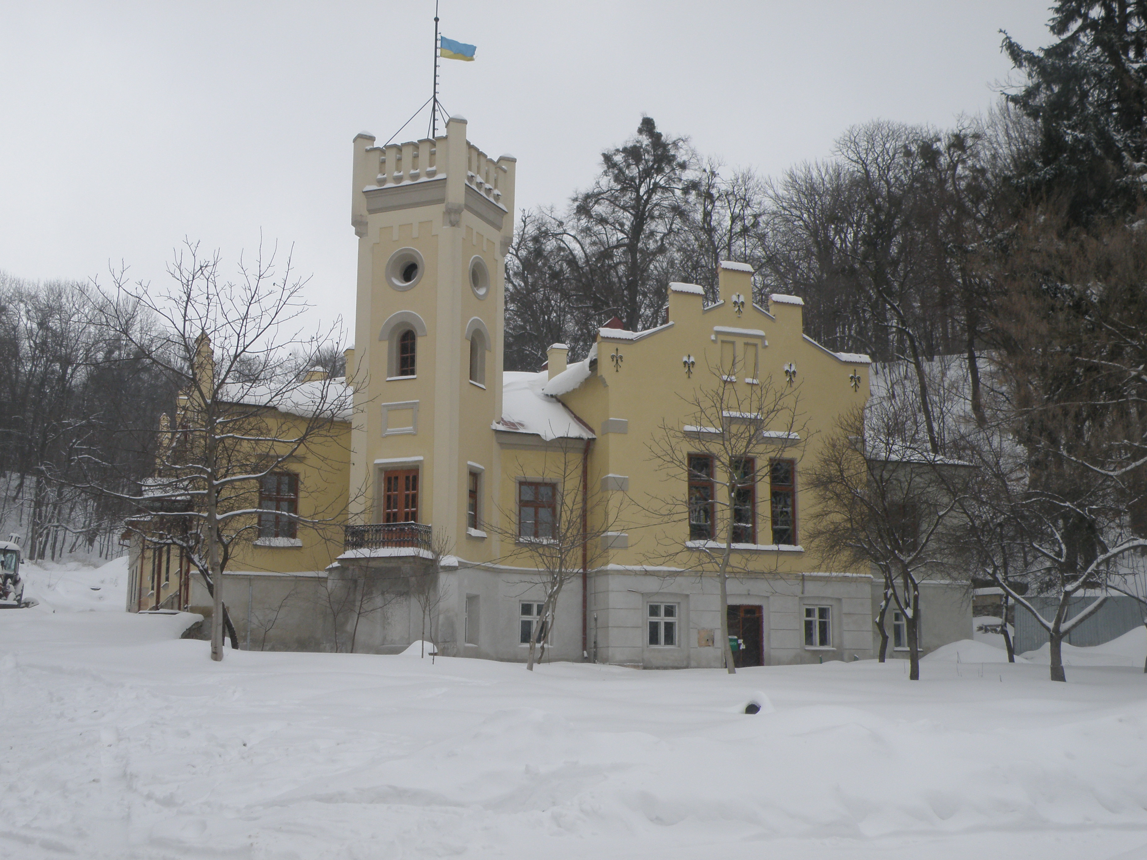 Міська_стрільниця(Львів)